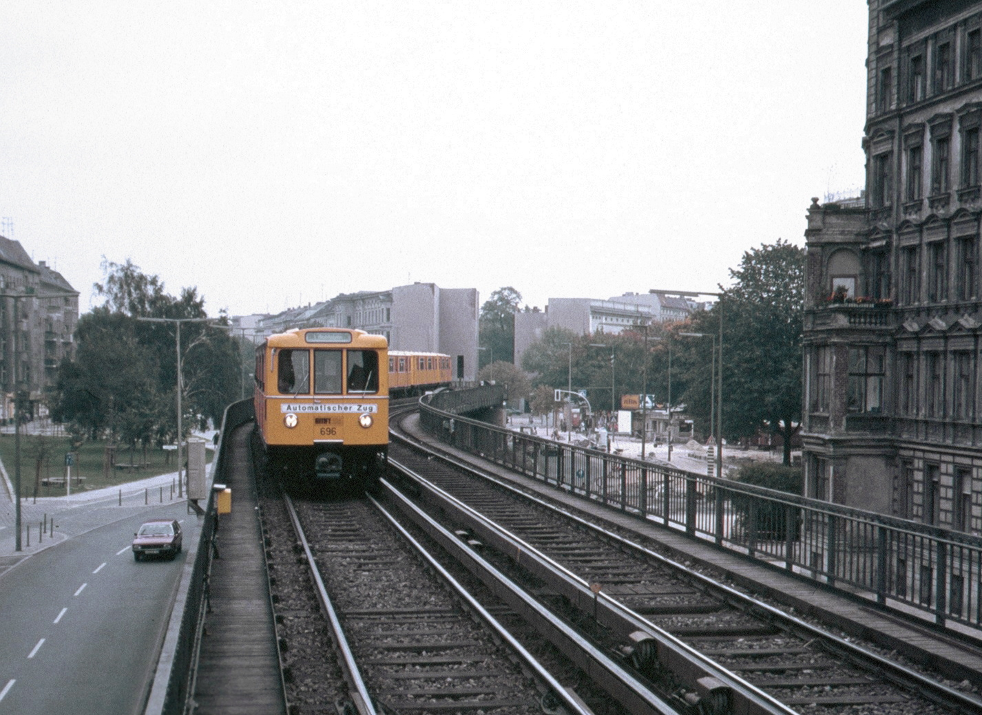 A3L Skalitzer Straße Berlin